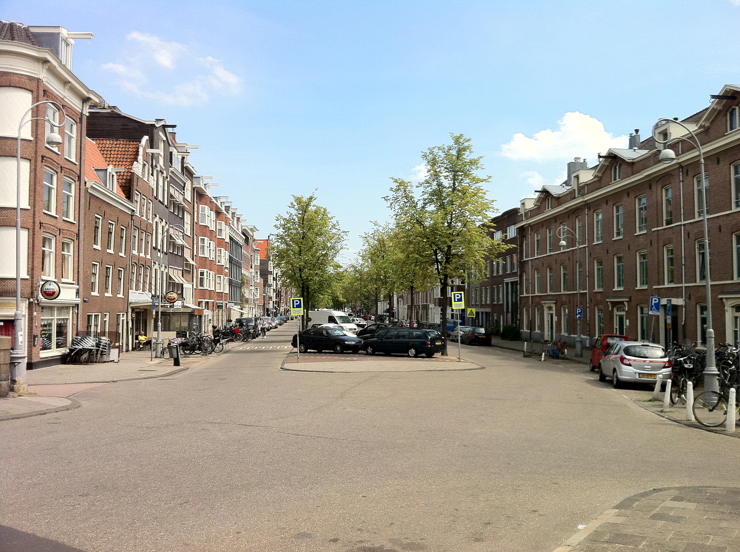 Westerstraat gezien vanaf de Anjeliersbrug over de Lijnbaansgracht